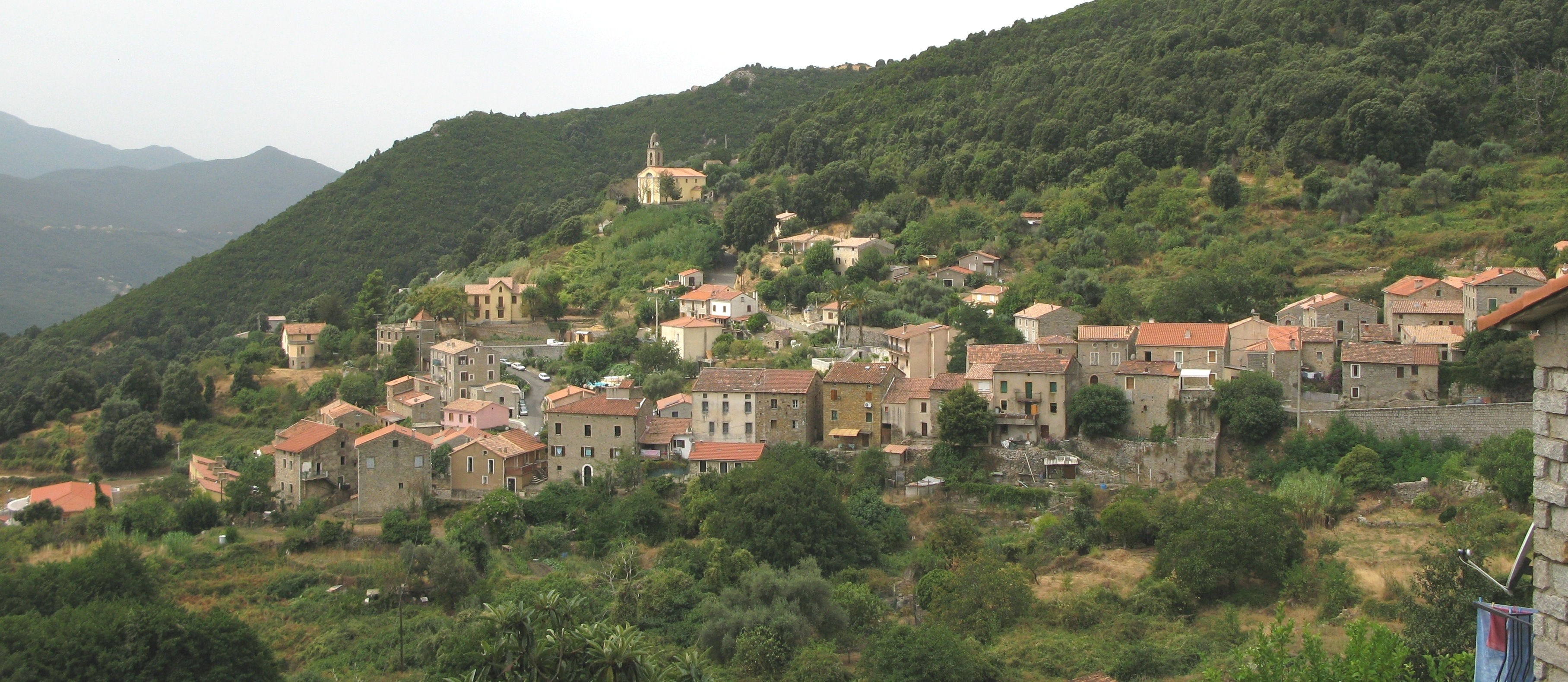 Ocana vun Norde gesinn. Kategorie:Uertschaften am Departement Corse-du-Sud